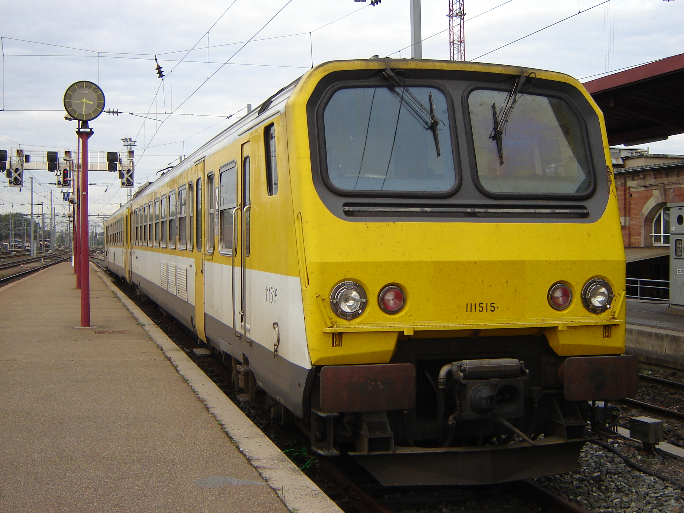 Z11515 TER Lorraine en Gare de Strasbourg, aux anciennes couleurs